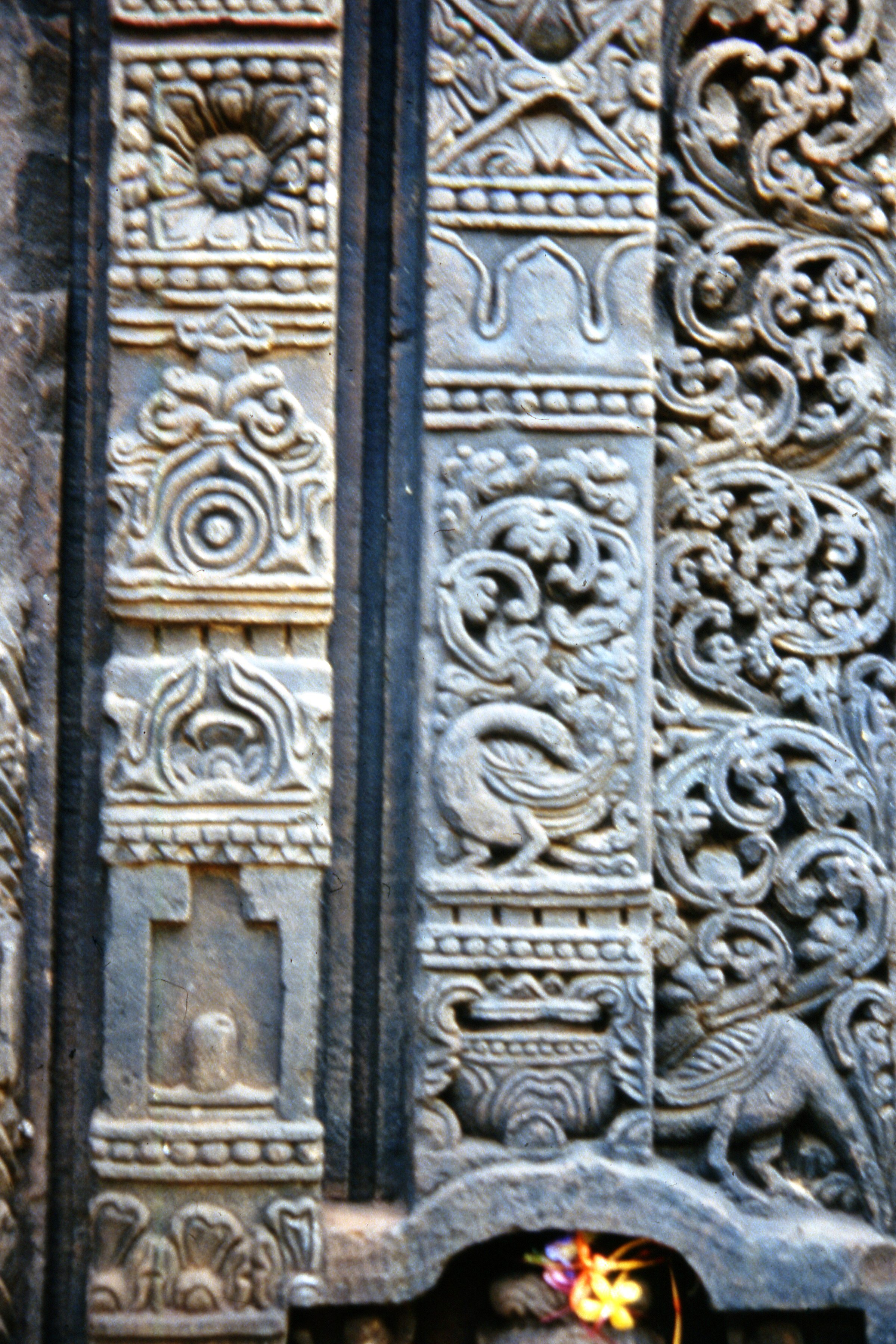 Siglo VII, Templo Parashurameshvara, Decoraciones en el templo que consisten de grabados de gansos (hamsa) así como girnaldas, en la parte inferior se puede apreciar el símbolo de la Purna-Kalasha y en la parte izquierda la imagen de un Lingam que representa a Shiva. Bhuvanesvar, Orissa, India.